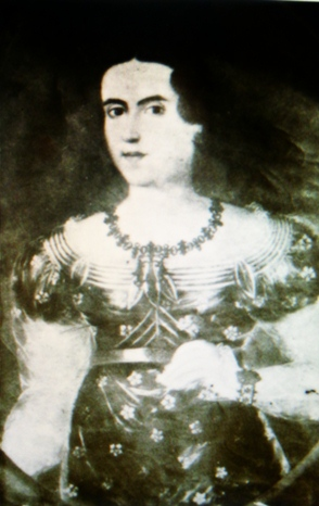 María Ana Carcelén de Guevara y Larrea, esposa del prócer independentista latinoamericano Antonio José de Sucre. Óleo sobre lienzo de autor desconocido, pintado en el siglo XIX y cuyo paradero se desconoce desde 1947.